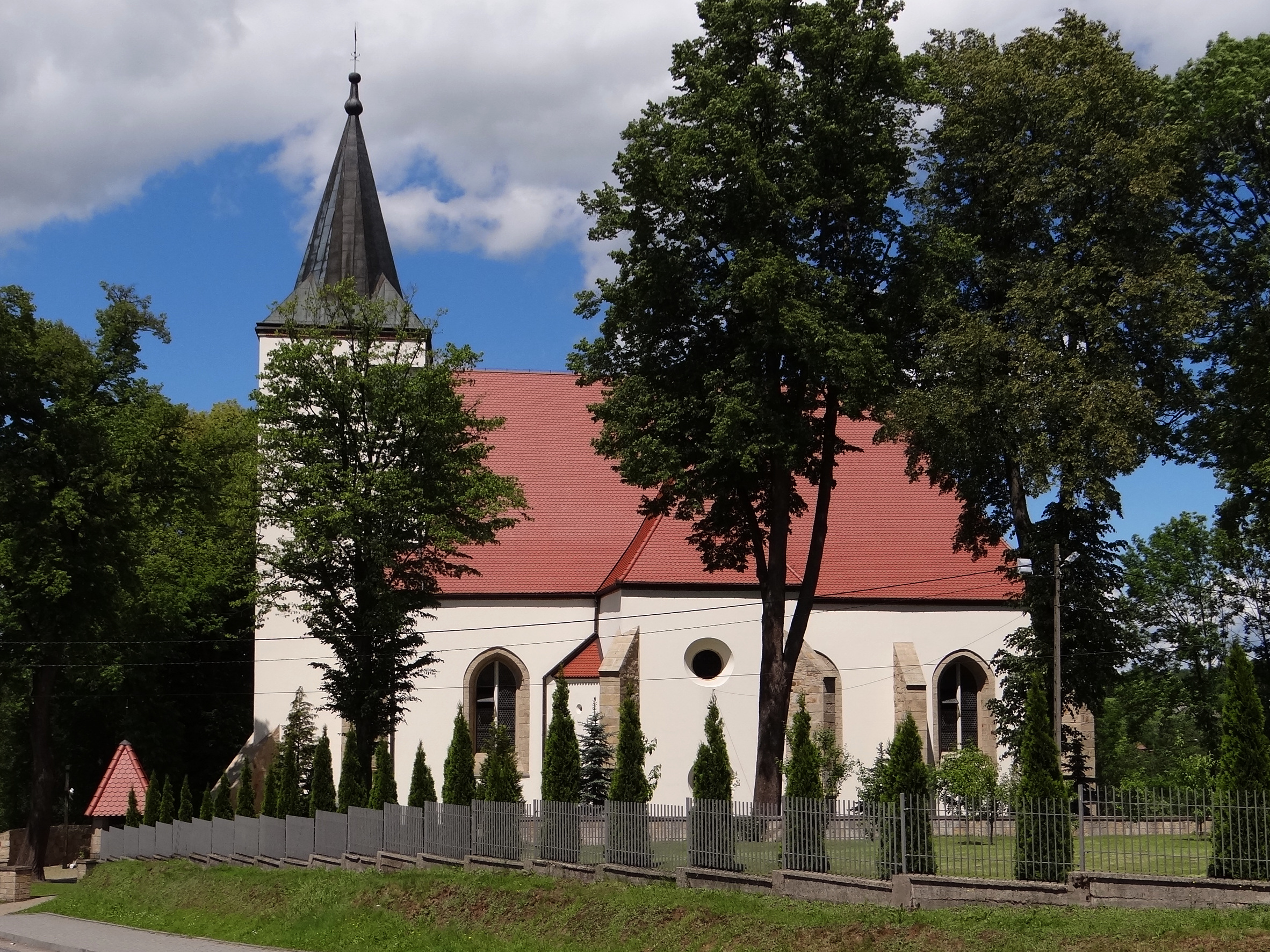 Kościół w Starym Wiśniczu